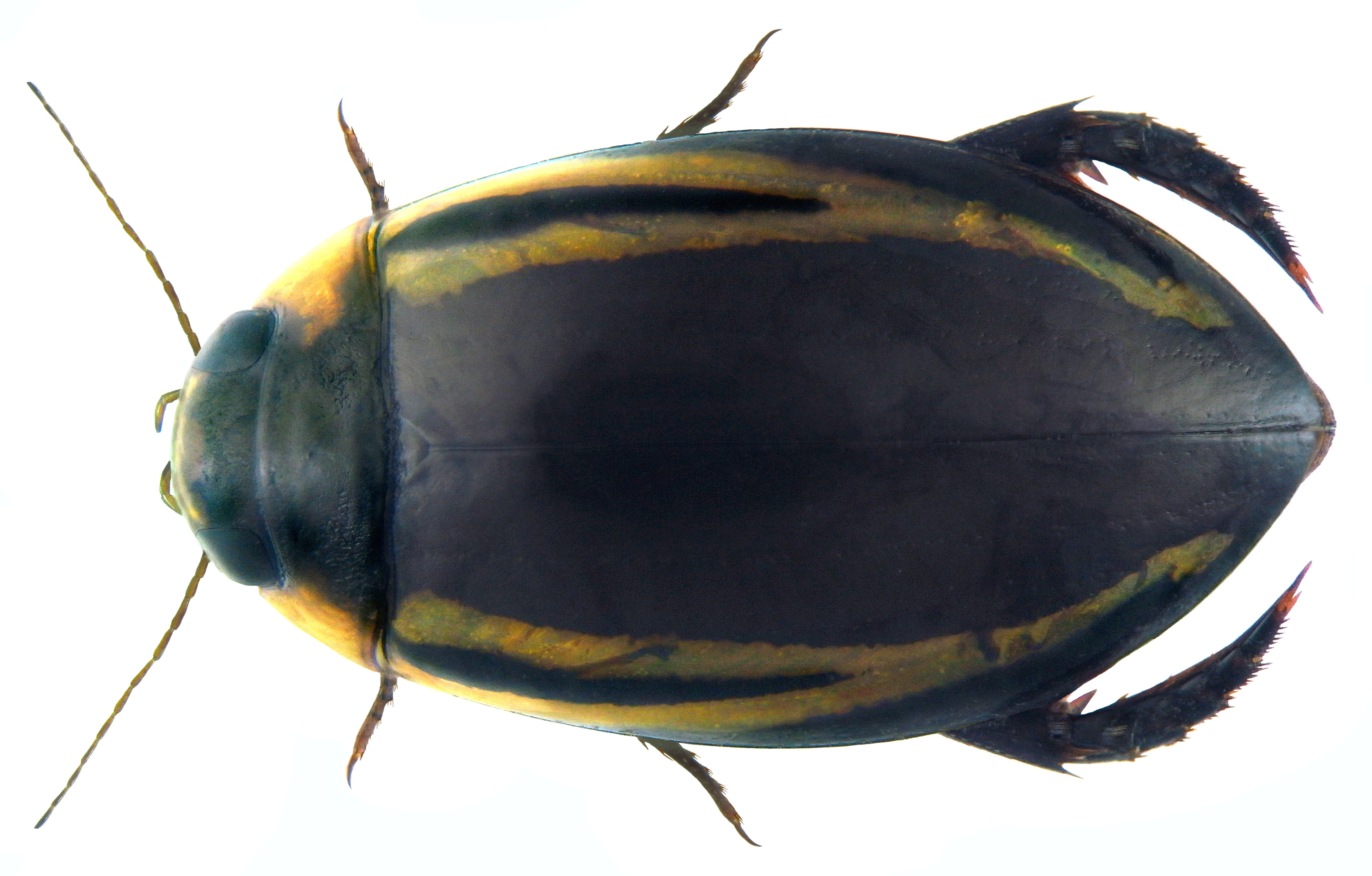 Hydaticus satoi Wewelka, 1975 female. Familie: Dytiscidae Groesse: 13,8 mm Fundort: Indien, Süd-Goa, Canacona, Raj Baga Beach leg.det. U.Schmidt, 2010 Photo: U.Schmidt, 2011